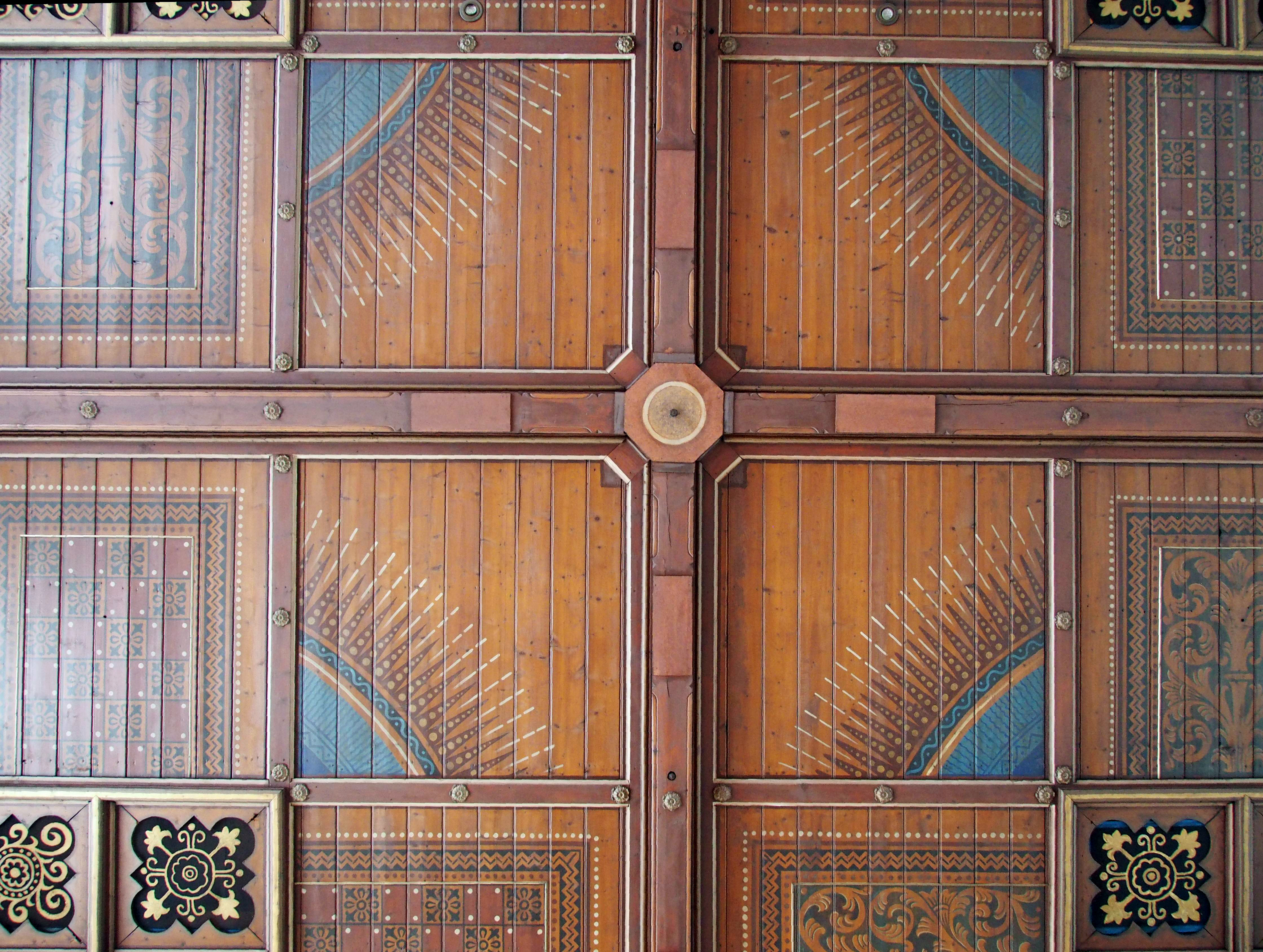 Kassettendecke in der katholischen Kirche „Zu den heiligen Schutzengeln“ auf Juist